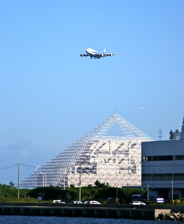 浮島町公園から撮影